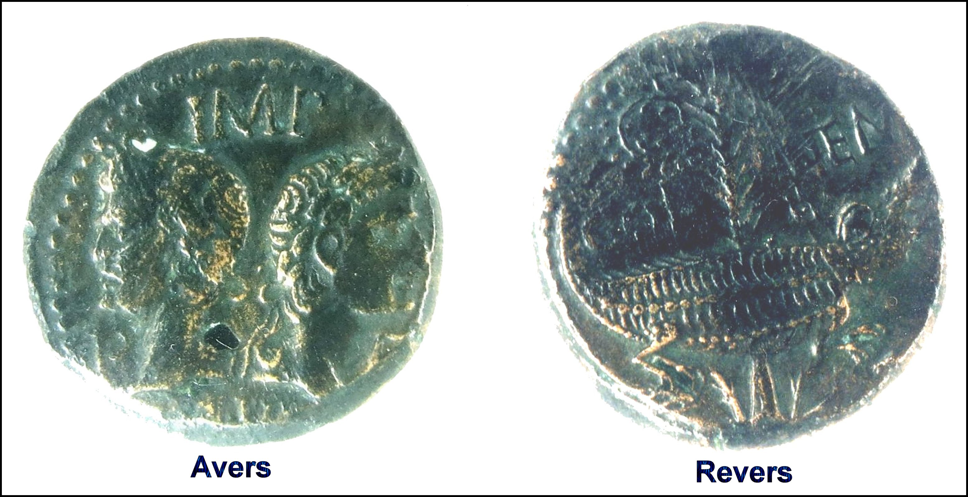 Pièce romaine dite As de Nîmes. Avers : Auguste et Agrippa. Revers : Crocodile enchaîné à un palmier (collection C.Rech)